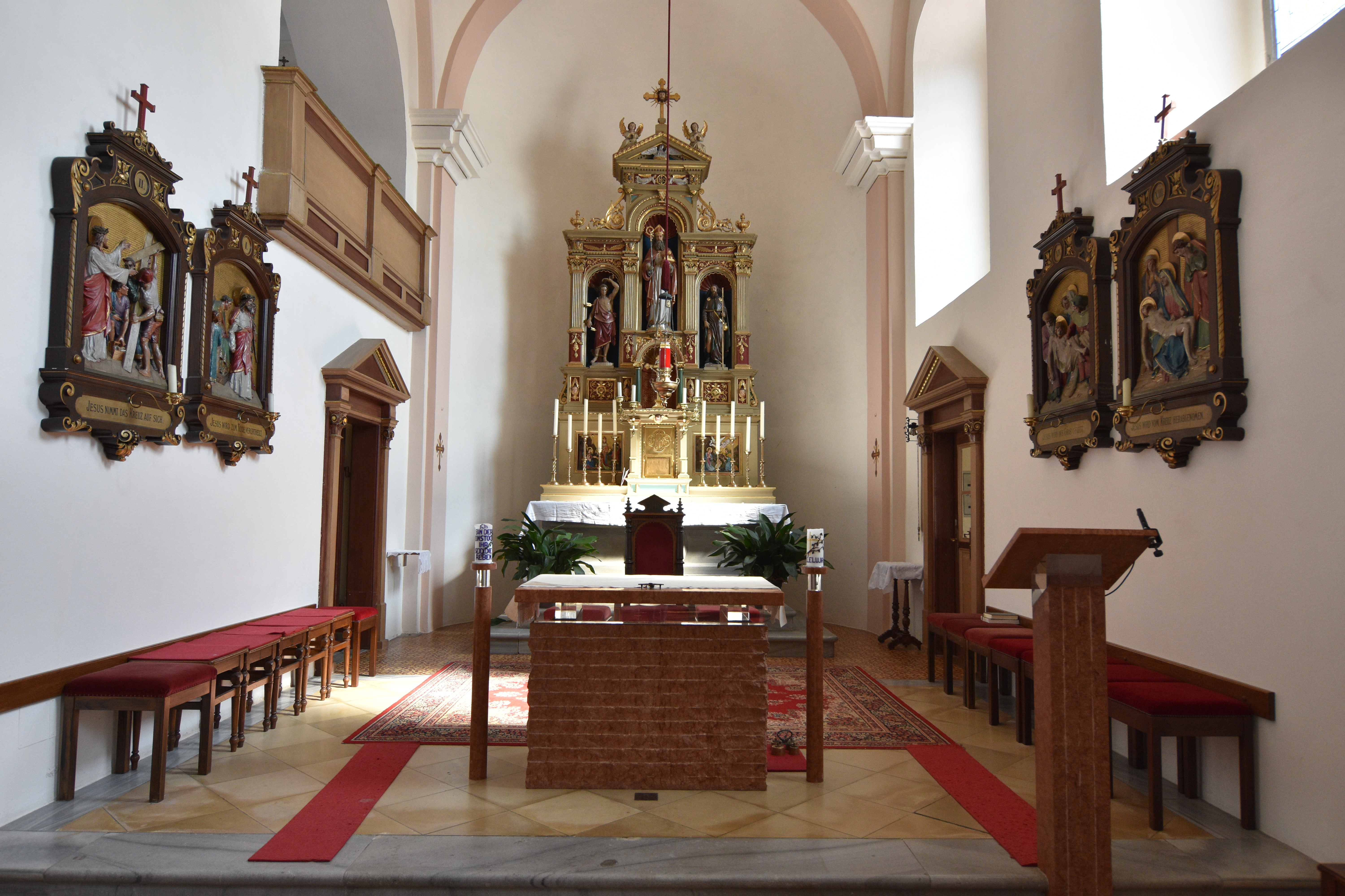 Kirche Nikolaus von Myra Sankt Nikolai ob Draßling Interior